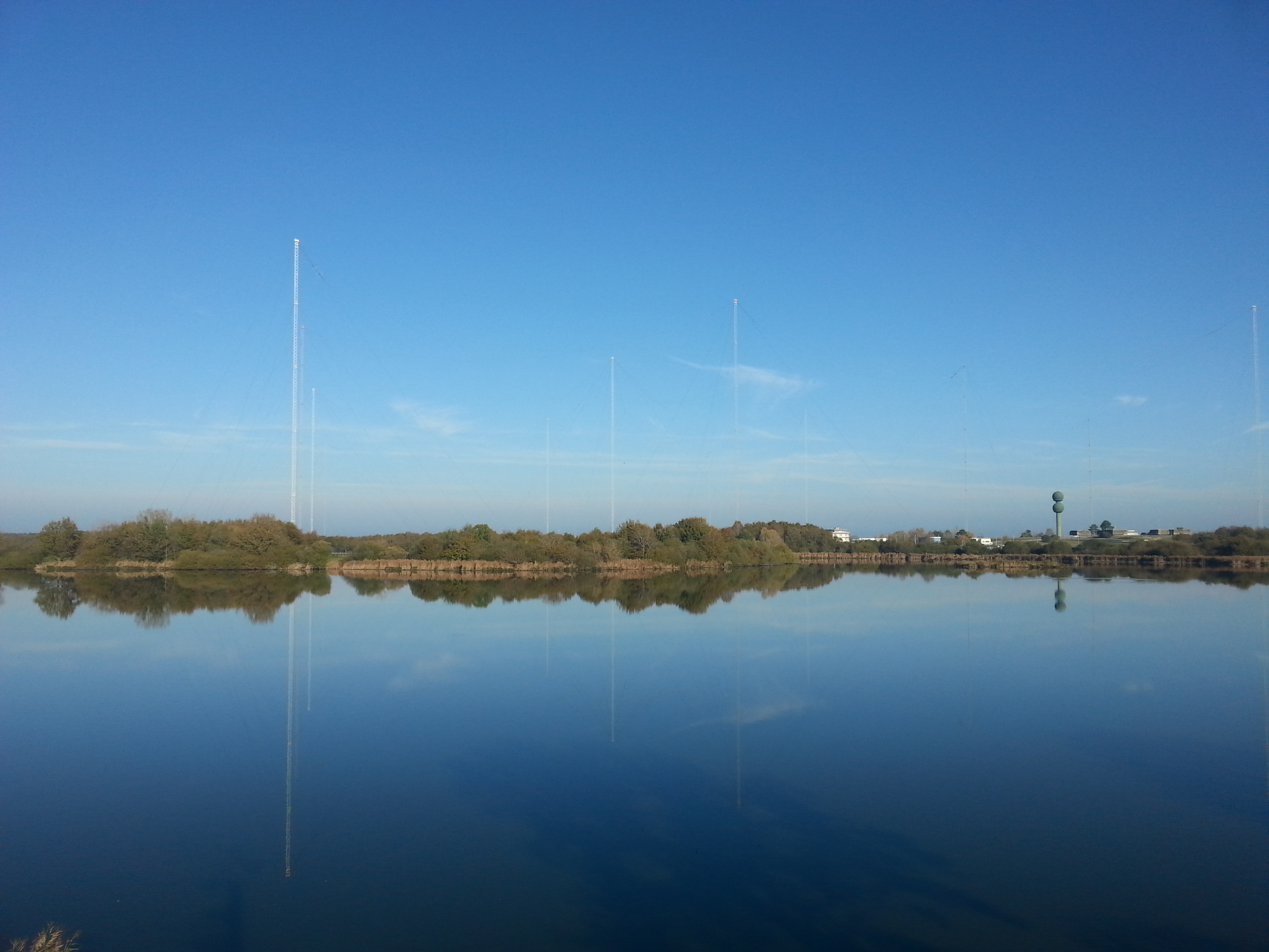 Rosnay (36) : Le centre de transmissions de la Marine nationale et l'étang du Coudreau.